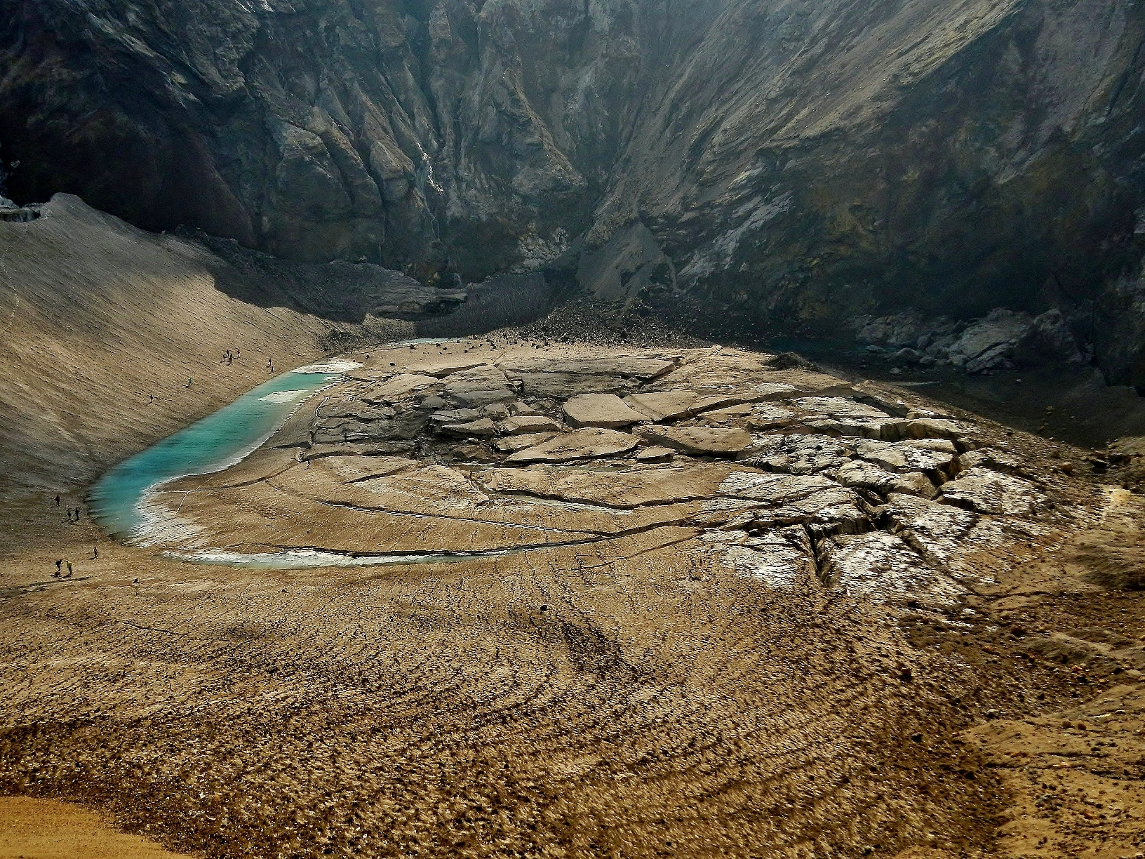 Снег в одном из кратеров Мутновского вулкана не тает всё лето. This image is related to the protected area of Russia number 4110032